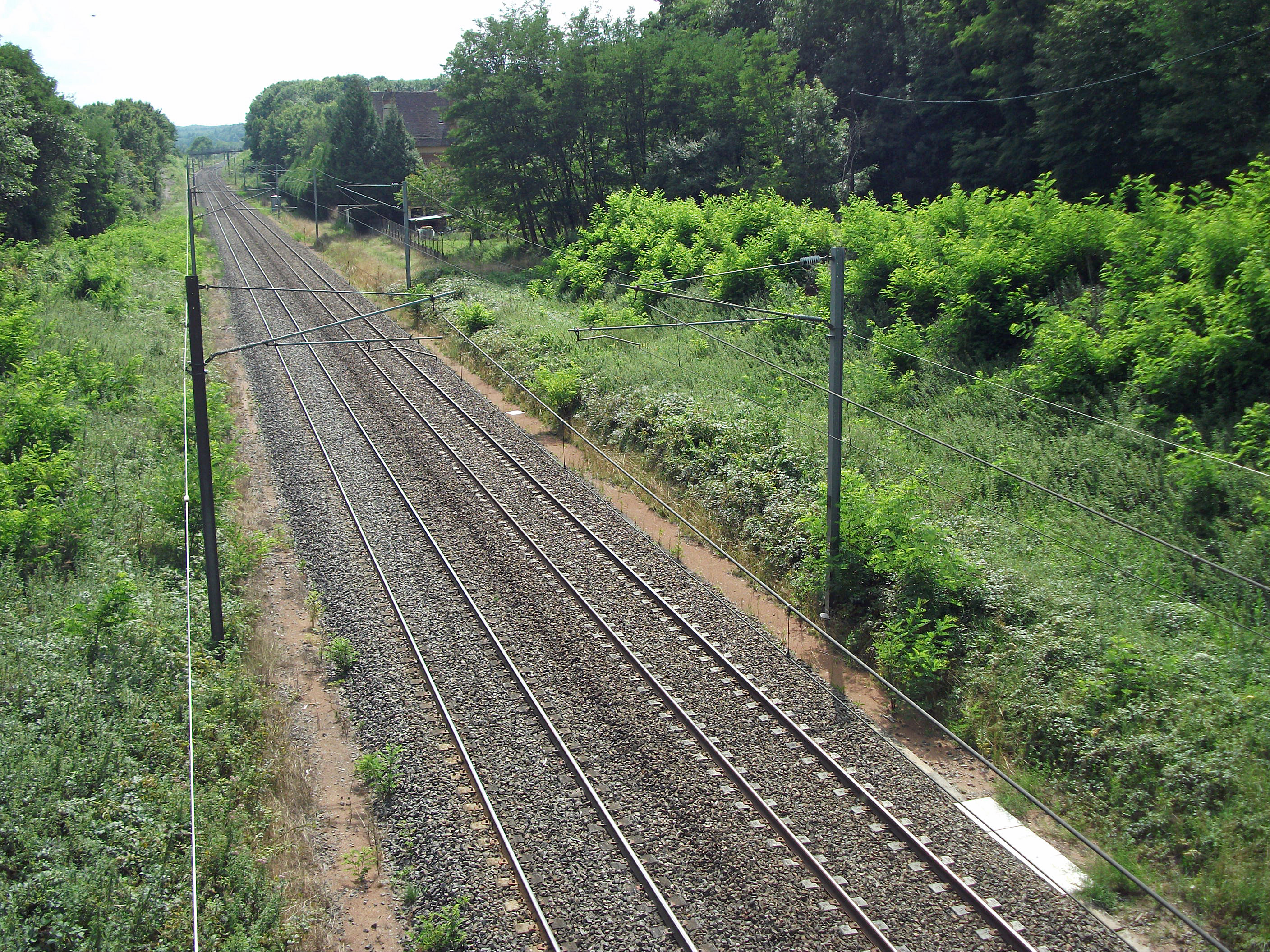 Ligne de Vichy à Riom, du pont de la D 434, vue en direction de Riom et au loin la gare PLM de Saint-Sylvestre-Pragoulin